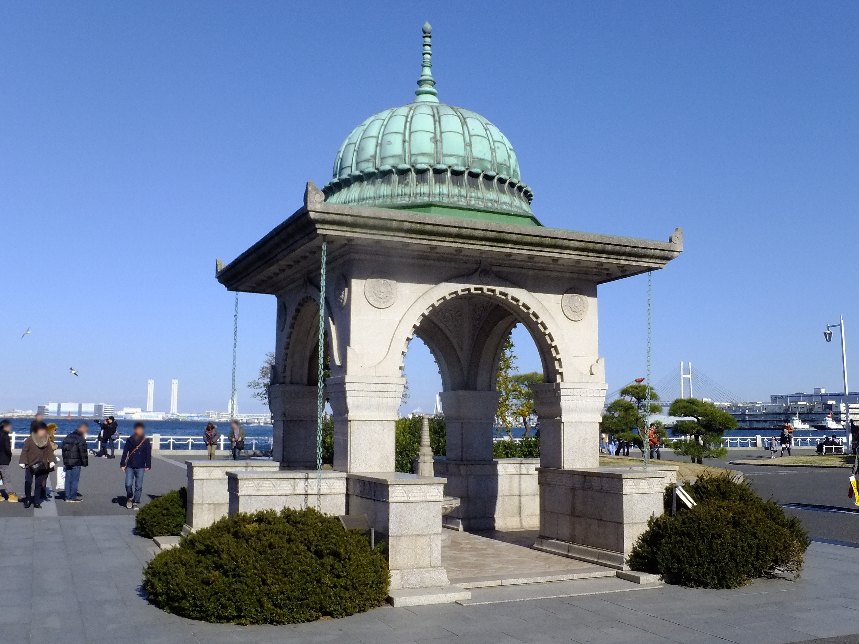 山下公園内、インド水塔